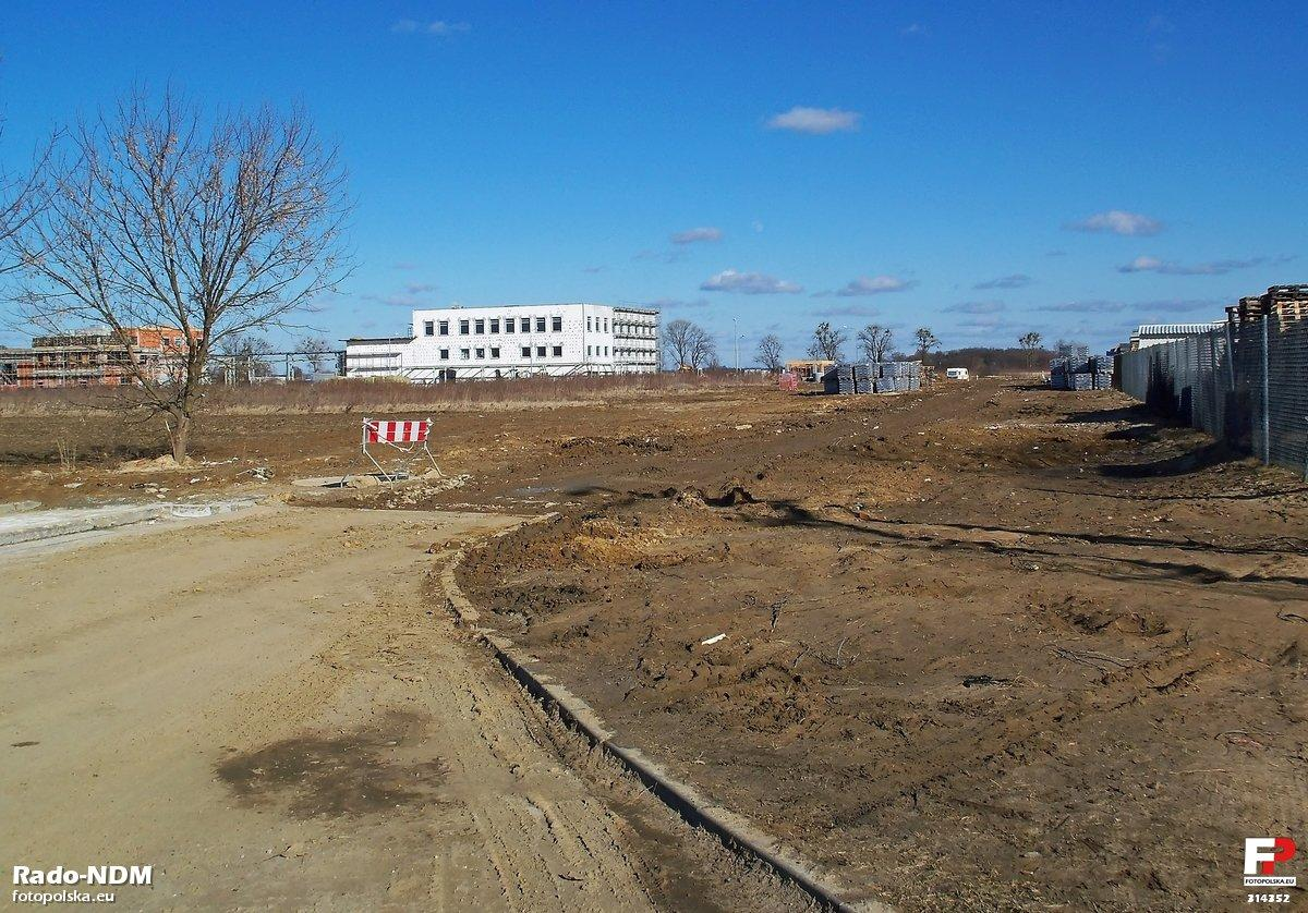 Fragment ulicy Przemysłowej w miejscu, od którego będzie przedłużona do ulicy Granicznej, w oddali budowa fabryki Pollena-Aroma, widok na wschód